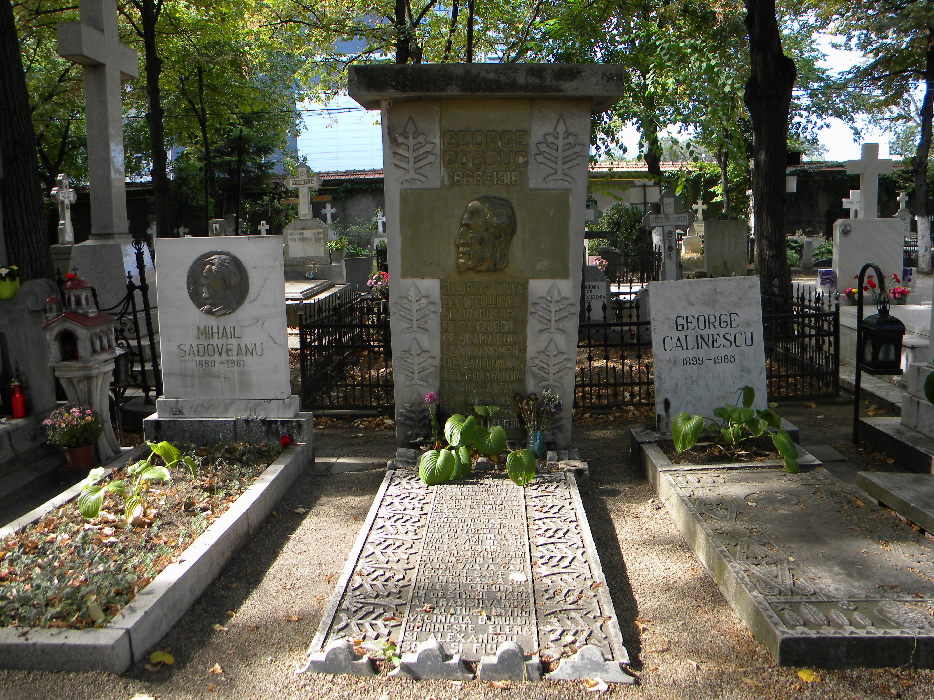 Bucuresti, Romania, Cimitirul Bellu Ortodox (Mormantul lui George Cosbuc - poet) 035